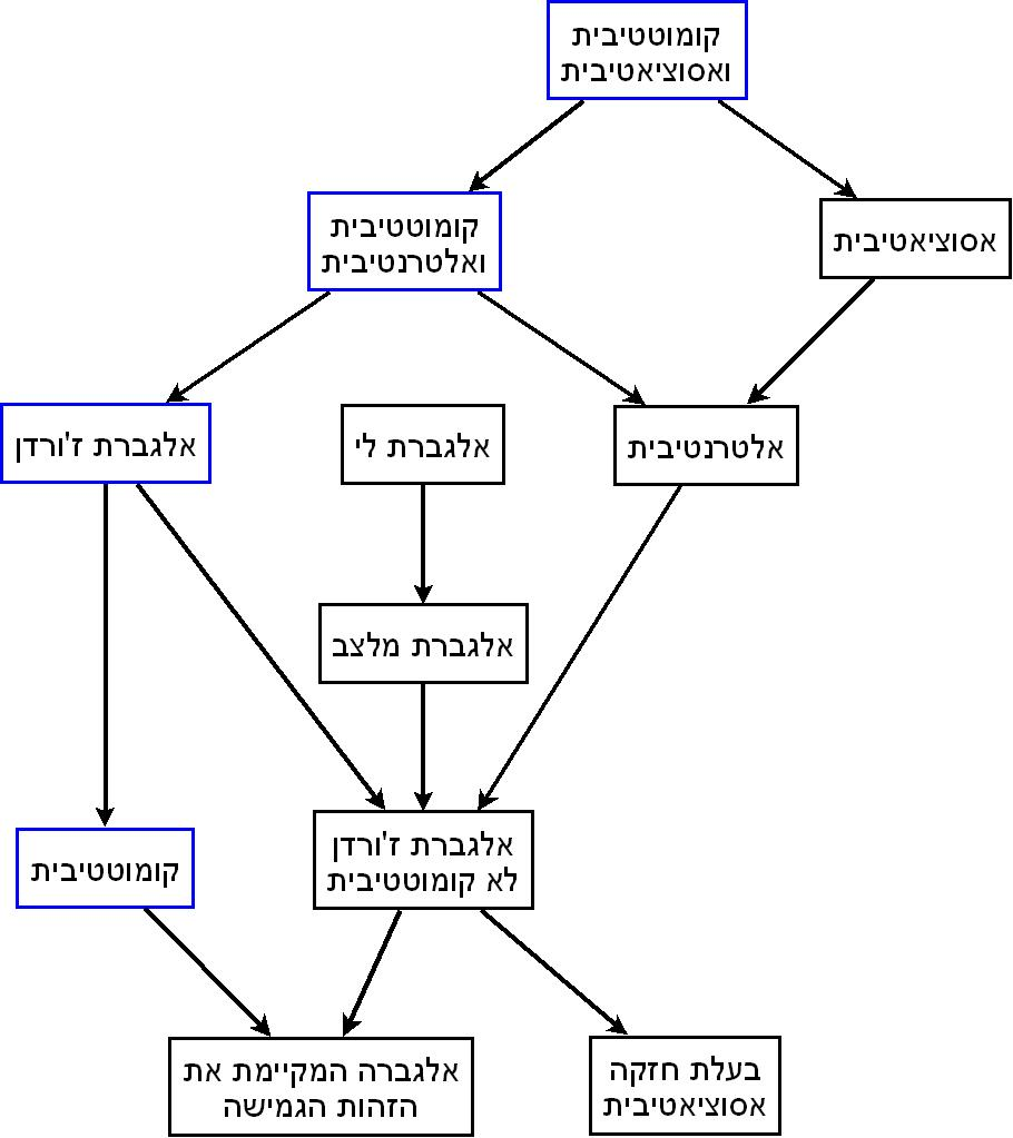 מחלקות של אלגברות לא אסוציאטיביות